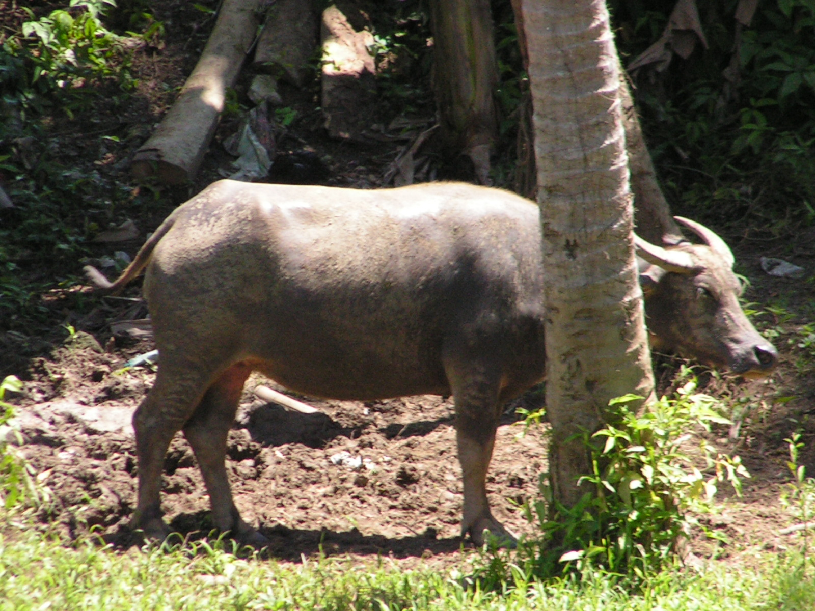 Philippine carabao